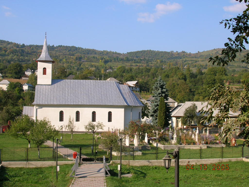 de oblio